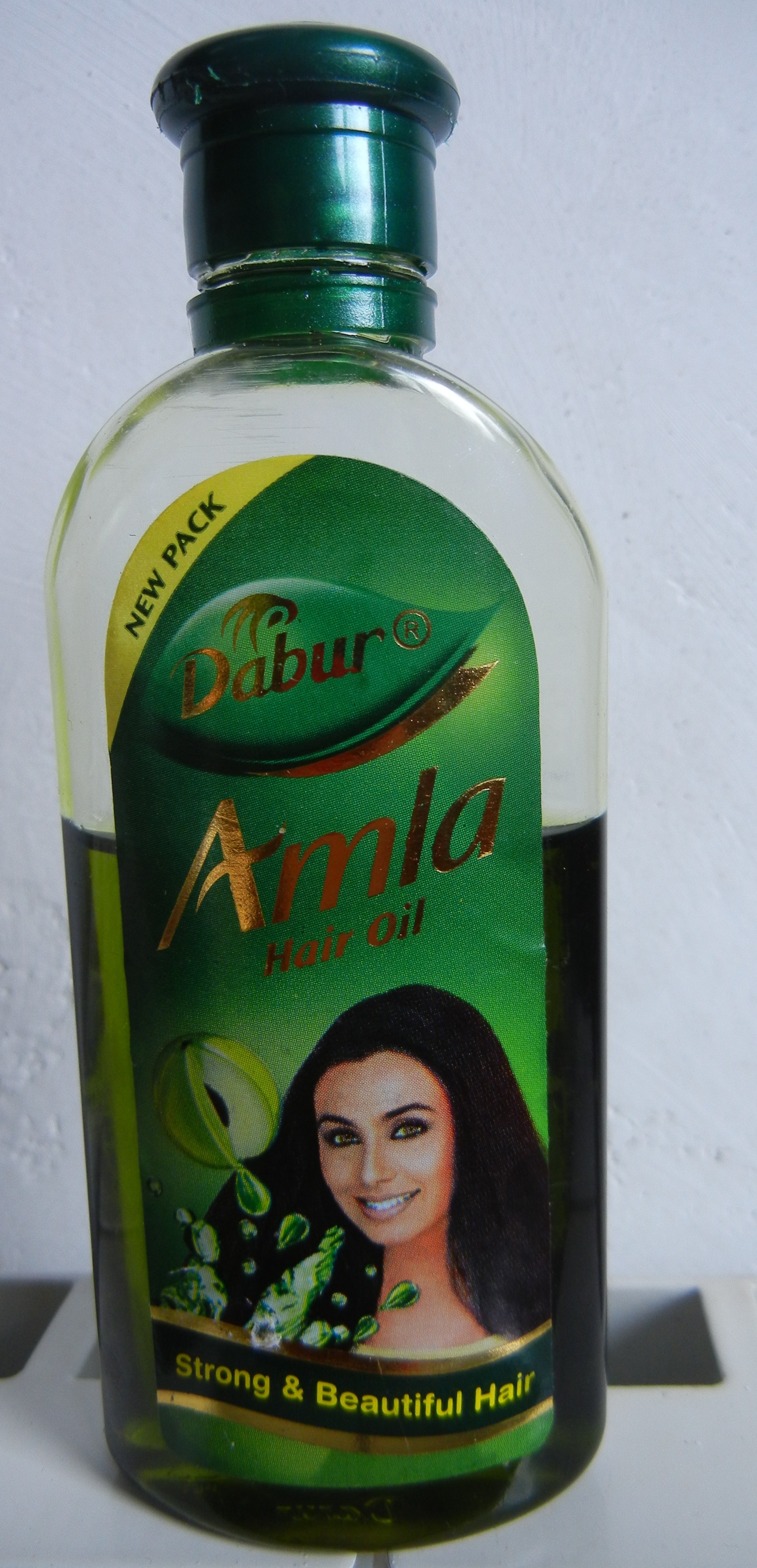 huile pour cheveux à l'amla de marque Dabur - made in india